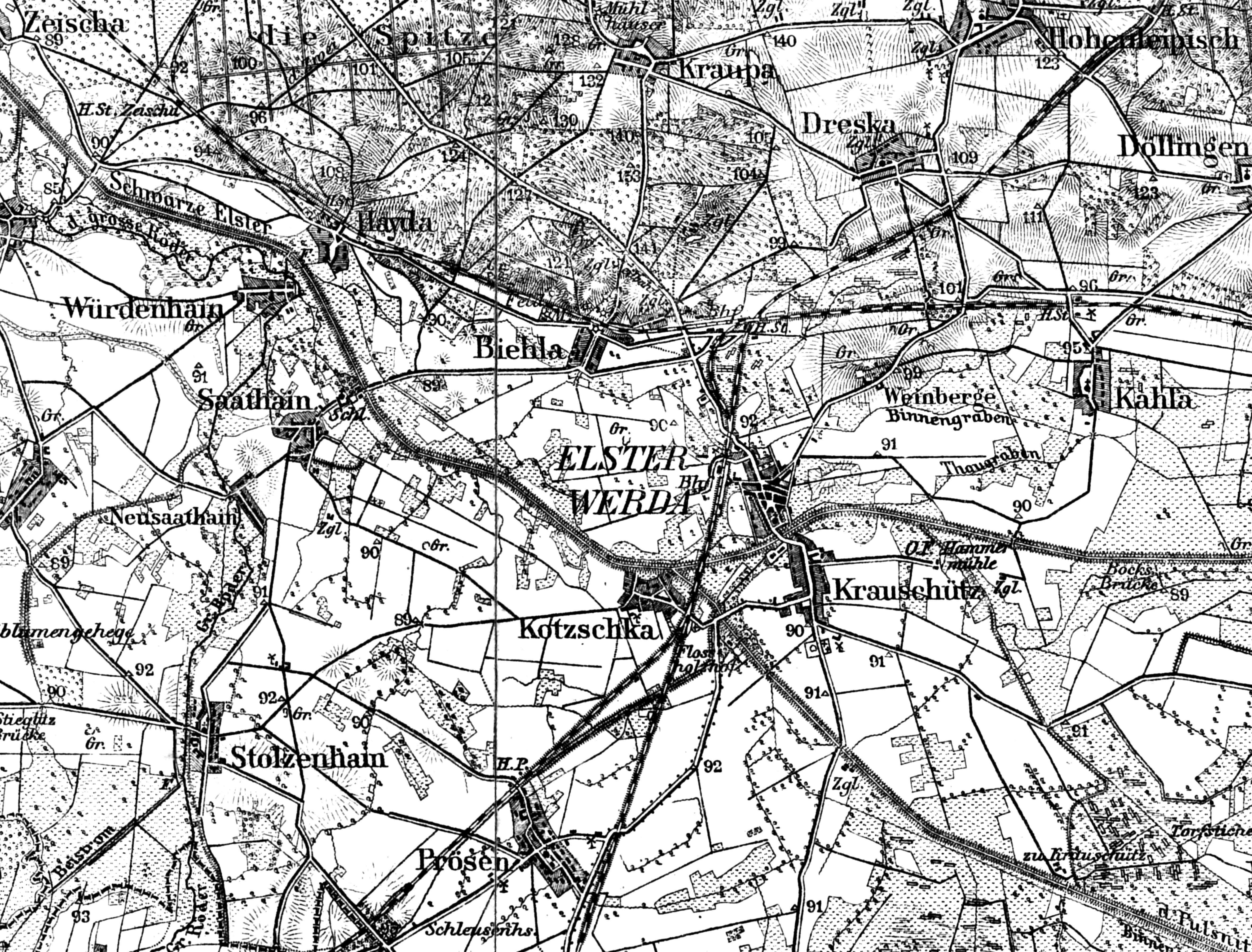 Ausschnitt Elsterwerda und Umgebung, aus Landkarte des Deutschen Reiches Nummer 392 Raum Großenhain, Umdruckausgabe von der Preussischen Landesaufnahme um 1890